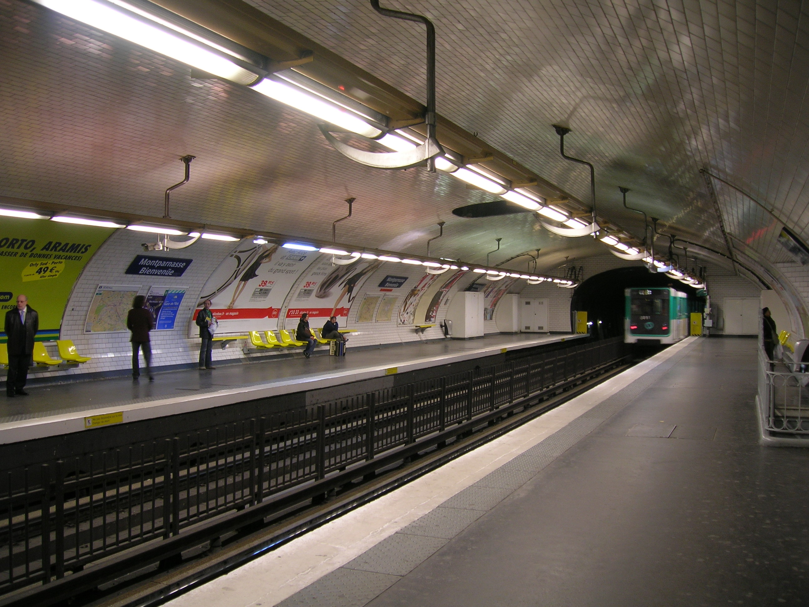 Quais de la station Montparnasse - Bienvenüe du métro de Paris, ligne 4